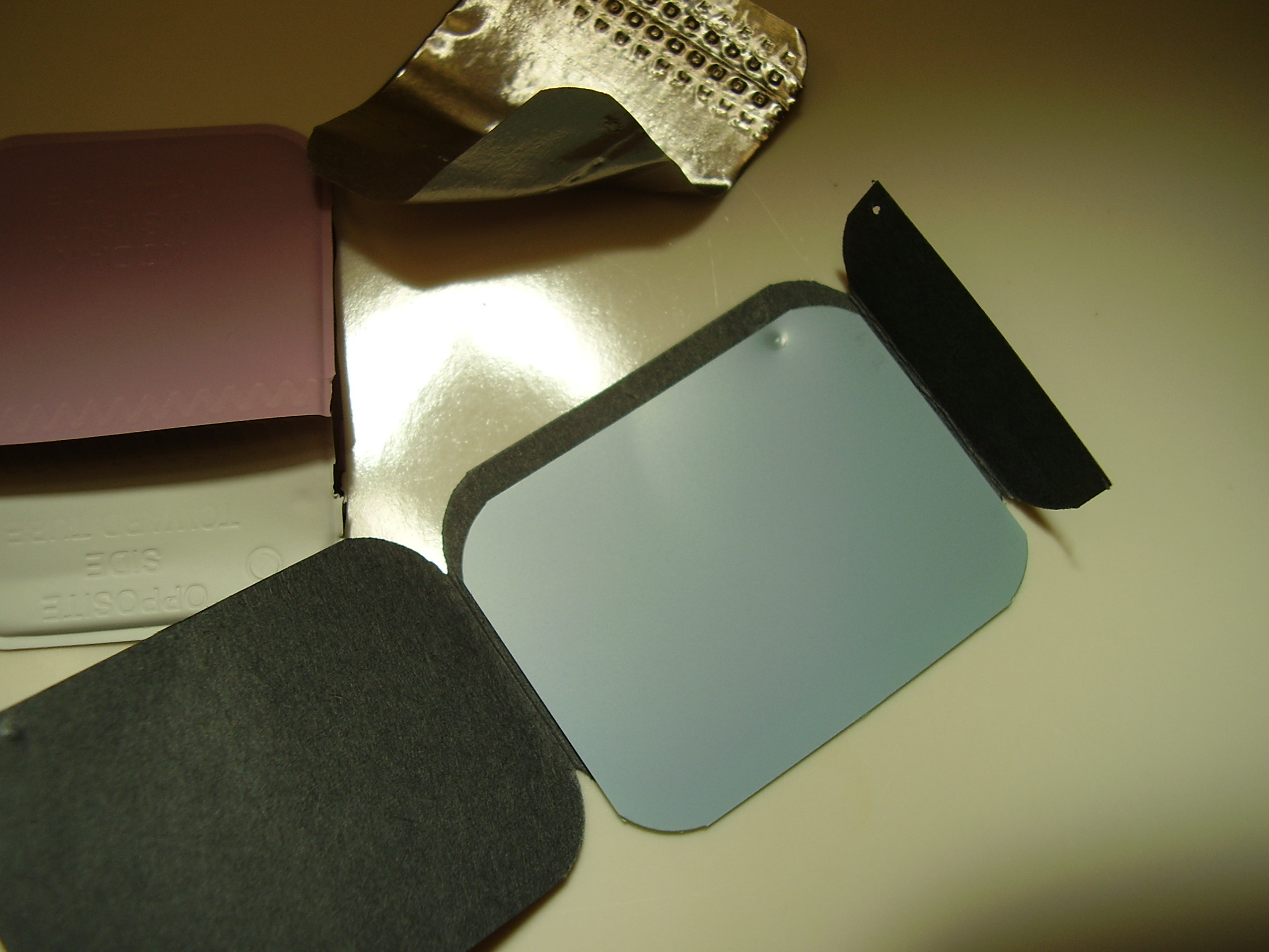 dental x-ray film, Zahnfilm (blau-grün) - der eingestanzte Punkt erleichtert die räumliche Orientierung bei der Auswertung (dazu muss dann aber auch beim Röntgen auf die Lage des Punktes geachtet werden - vereinbarungsgemäß immer nach mesial), Bleifolie, Kunststoffhülle, schwarzes Papier